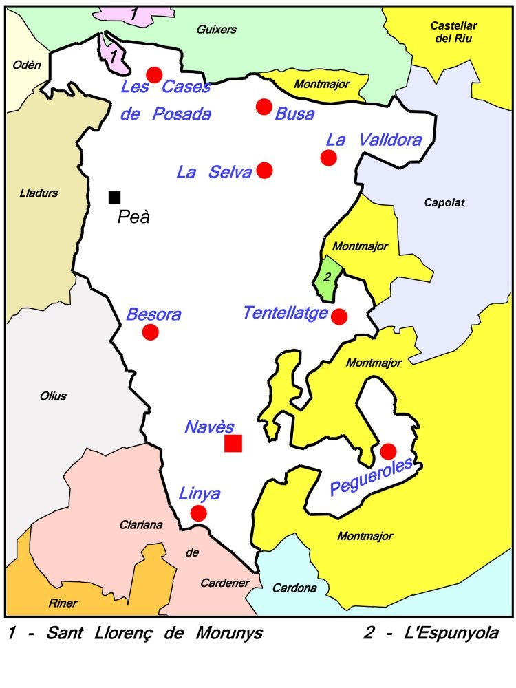 Mapa del municipi de Navès (Solsonès) amb les seves 9 entitats de població i els municipis limítrofes.